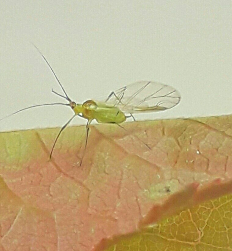 Afido alado